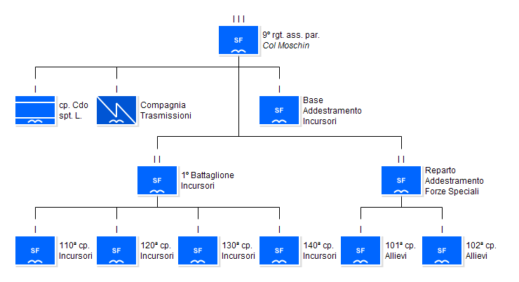 Attuale struttura del 9º rgt. ass. par. "Col Moschin".